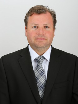 Renzo Aldo Trisotti Martínez